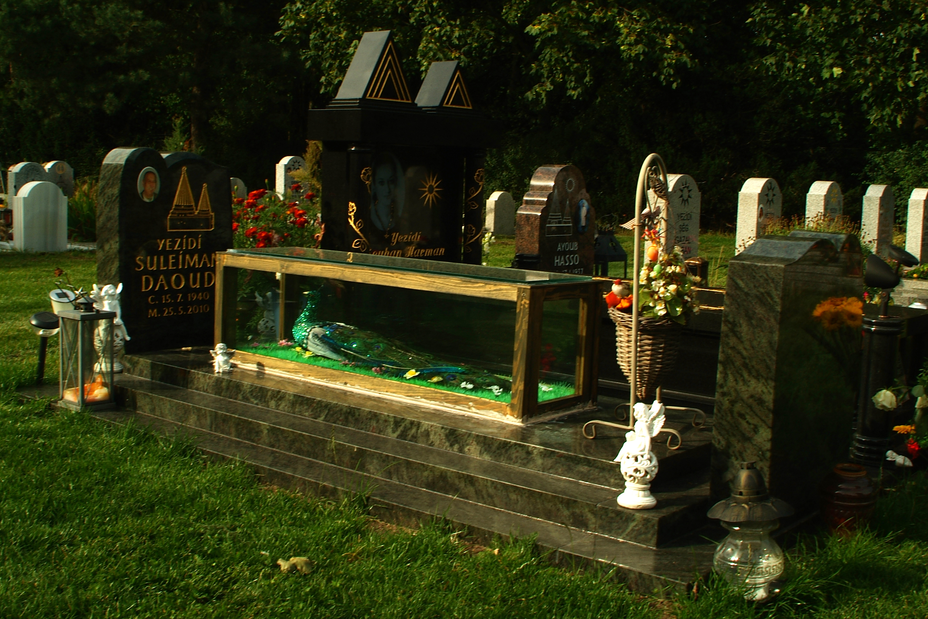 Yesidisches Gräberfeld Stadtfriedhof Hannover Lahe Pfau im Schaukasten auf dem Grab von Yezidi Suleiman Daoud Kurdî: Gora Êzîdiyekî bi navê Silêman Dawid li goristana êzîdiyên Hannover , Almanyayê.